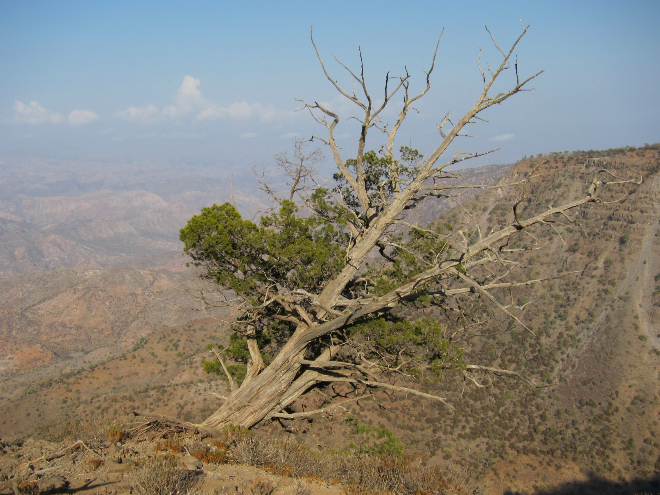 Juniperus procera Hochst. ex Endl. en bordure de la Forêt du Day, Djibouti